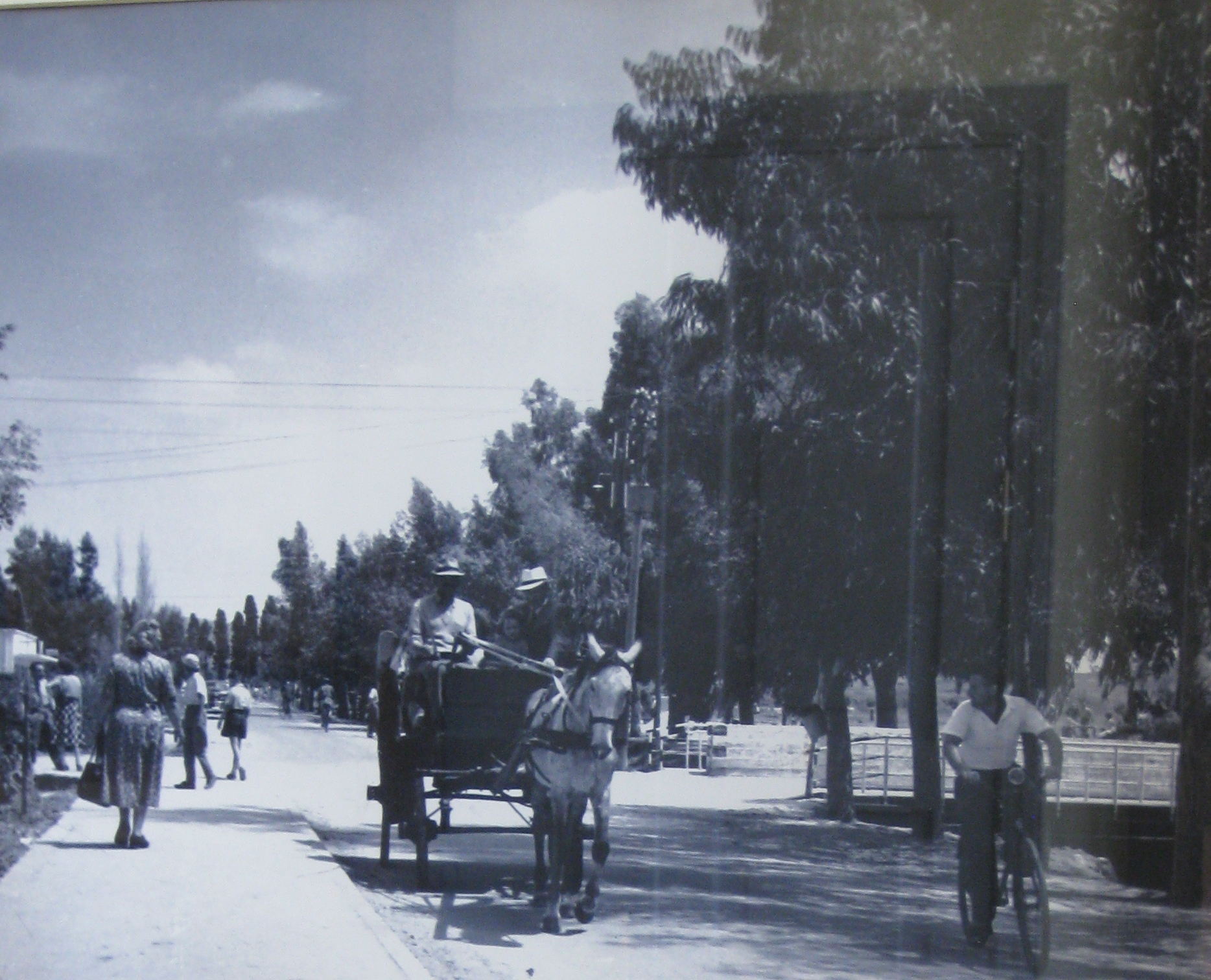 Nahariyya - Liberman House Museum - Historical images of Nahariyya נהריה בית ליברמן - מוזיאון להיסטוריה של נהריה - תצלומים היסטוריים של נהריה שדרות הגעתון, הרחוב הראשי של נהריה בשנות ה50